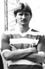 Title: Mannschaftsfoto HFC Chemie Factual corrections and alternative descriptions are encouraged separately from the original description. Additionally errors can be reported at this page to inform the Bundesarchiv. Original historic description: ADN-ZB-Lehmann-23.8.83-zin-Halle: Die Mannschaft des HFC Chemie für die Fußball-Oberligasaison 1983-84. Vorn v.l.n.r.: Jens Helling, Lutz Radtke, Torhüter Frank Jaenecke, Torhüter Michael Walther, Uwe Lorenz und Holger Krostitz. Mitte v.l.n.r.: Roland Wawrzyniak, Dieter Strozniak, Jens Henschel, Werner Peter, Frank Pastor und Lothar Kurbjuweit. Stehend v.l.n.r.: Klaus Urbanczyk, verantwortlicher Oberligatrainer, Nobert Schübbe, Gerald Wagner, Andreas Wagenhaus, Jürgen Schliebe, Manfred Fülle, Mannschaftskapitän Hartmut Meinert, Michael Rehschuh, Wolfgang Schmidt und Trainer Wolfgang Kleinschmager.